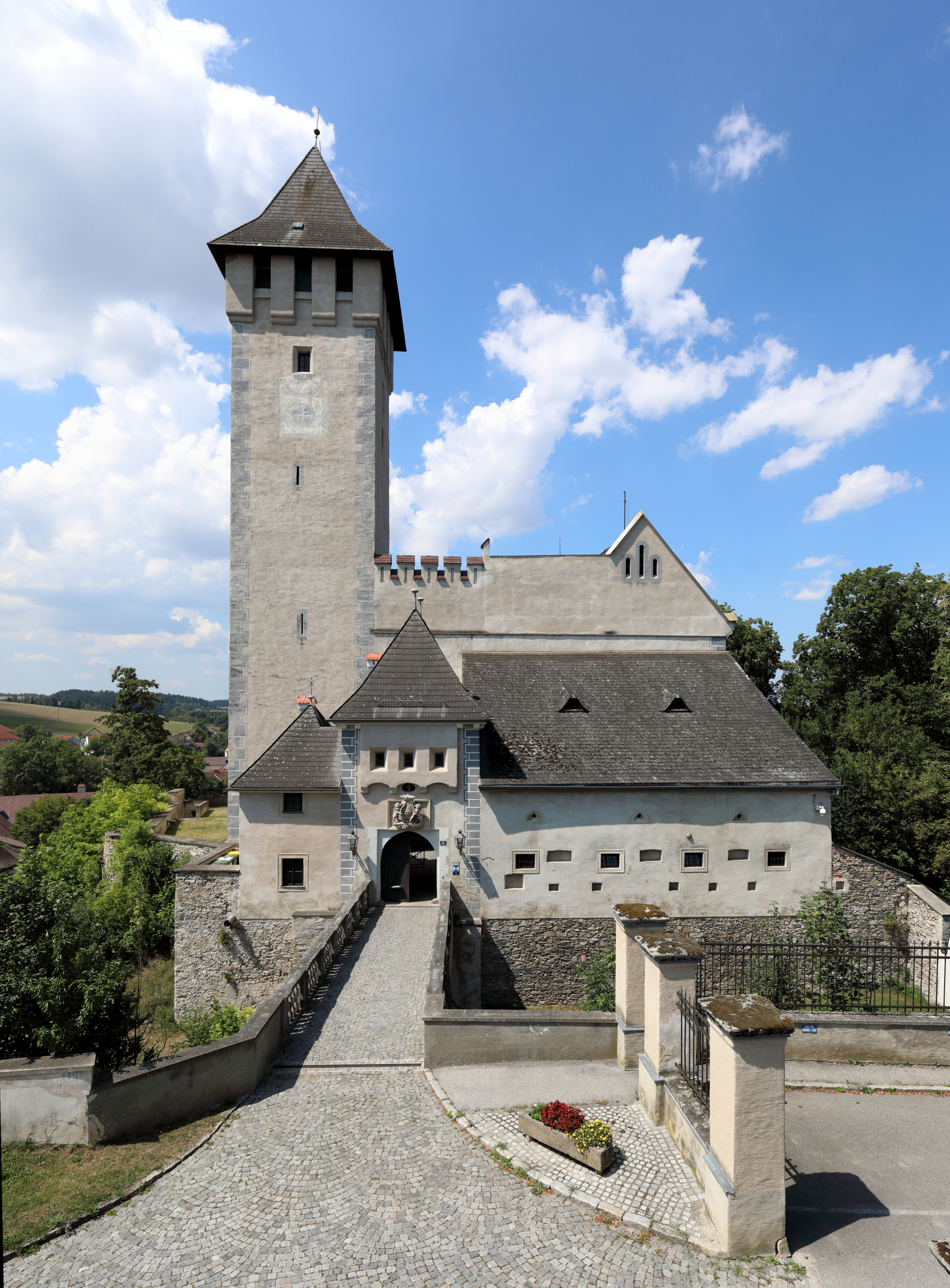 Ostansicht des Schlosses Allentsteig in der niederösterreichischen Stadtgemeinde Allentsteig.Die Wehranlage wurde um 1100 von den Kuenringer gegründet und sukzessiv ausgebaut. Von 1544 bis 1570 erfolgte eine Erweiterung und Umbau zu einem Renaissanceschloss. Derzeit (2018) ist im Schloss das Kommando des Truppenübungsplatzes Allentsteig untergebracht.